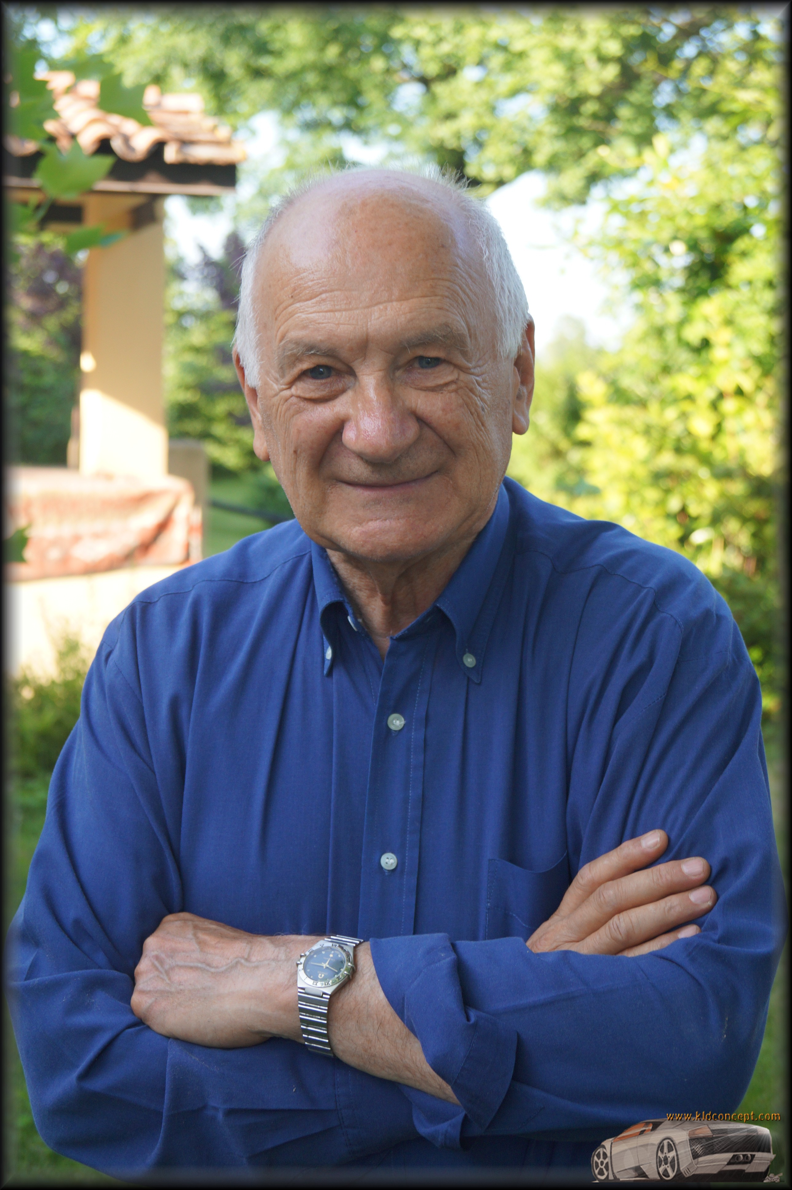 photos prise en MAI 2015